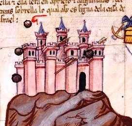 הסתערות יהודה המכבי על החקרא, תנ"ך אלבה.